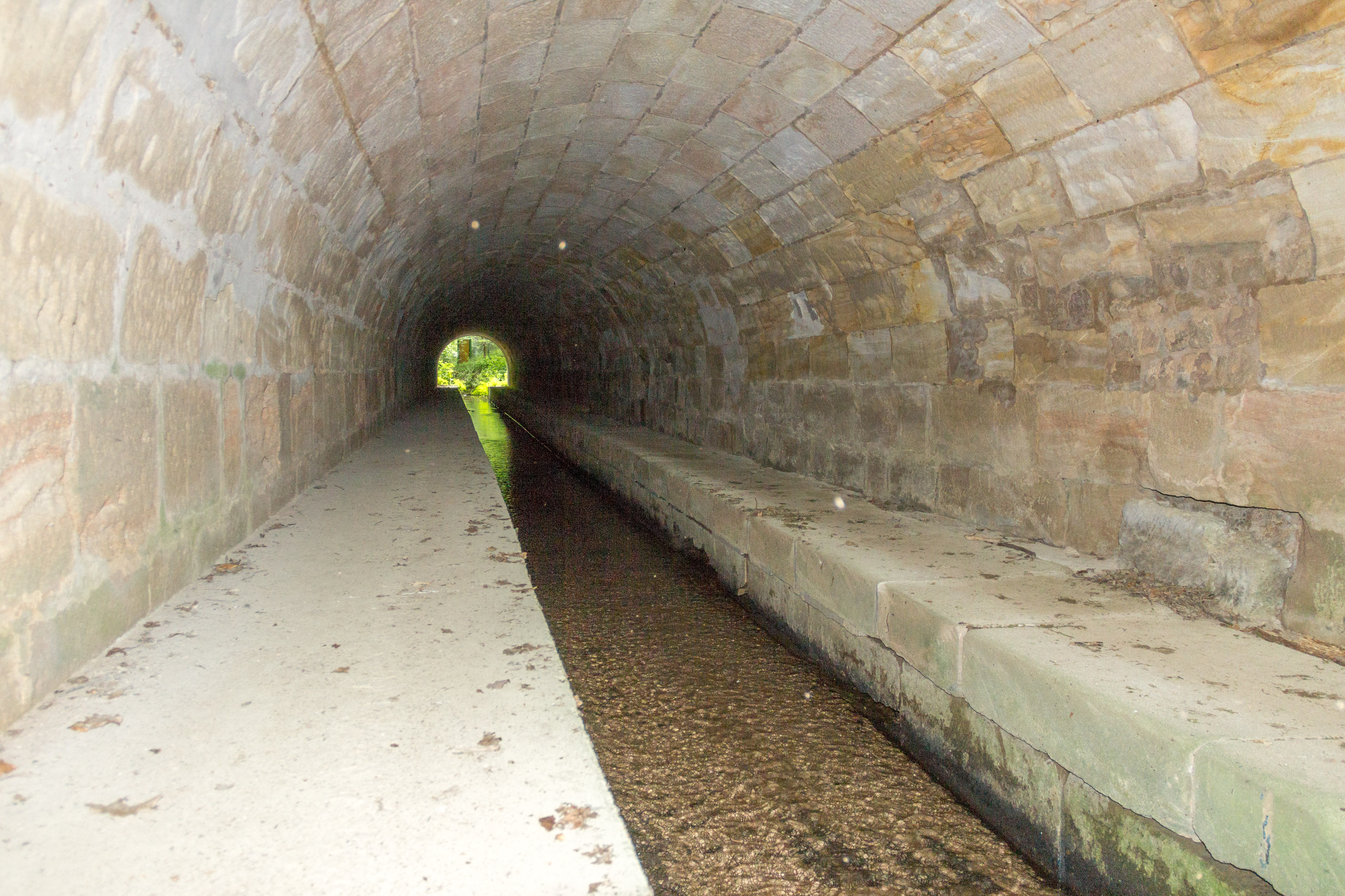 Ludwig-Donau-Main-Kanal, Mühlbach, Durchlass, Innen